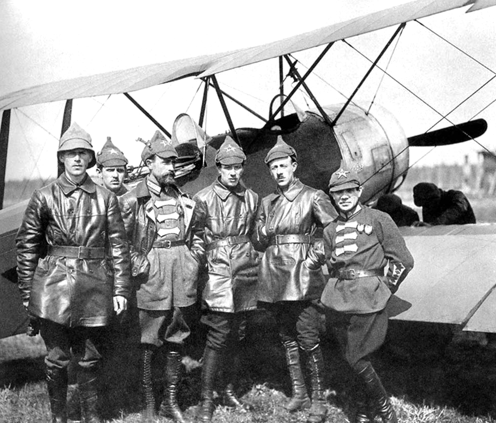 Первые красвоенлеты